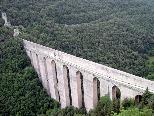 Spoleto (Italy) - Il Ponte delle Torri